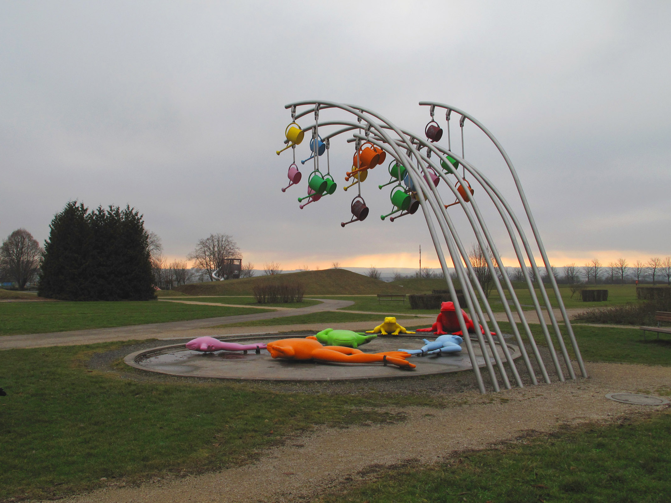 Rosalie: Frosch - Wasser, Brunnen. Skulpturenensemble, 6 Frösche und 20 Gießkannen an Stahlrohren, ovales Wasserbecken, im Scharnhauser Park (Ostfildern), 2002